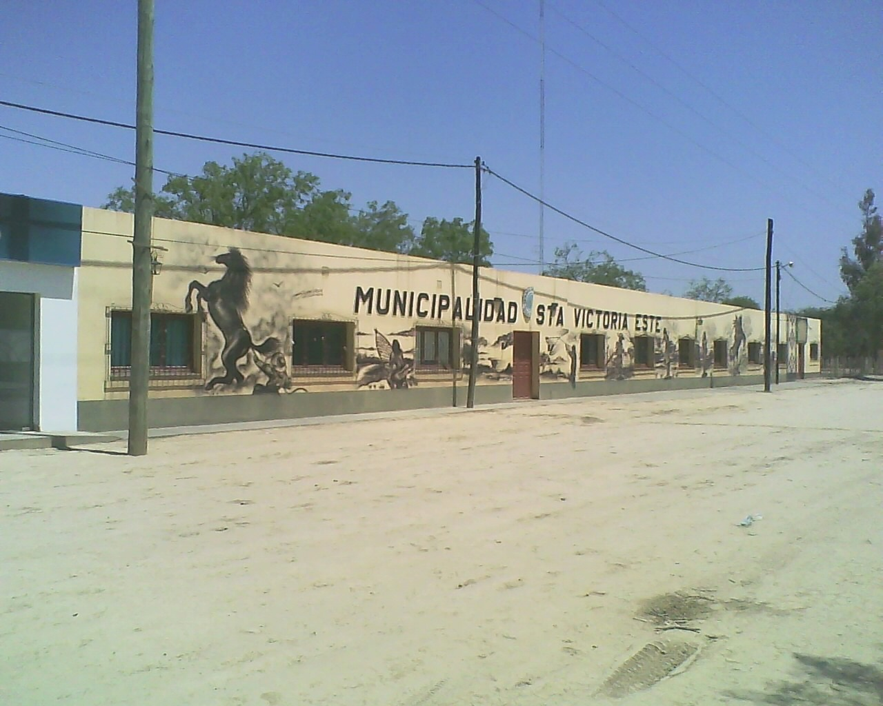 EDIFICIO MUNICIPAL - Santa Victoria Este - Rivadavia